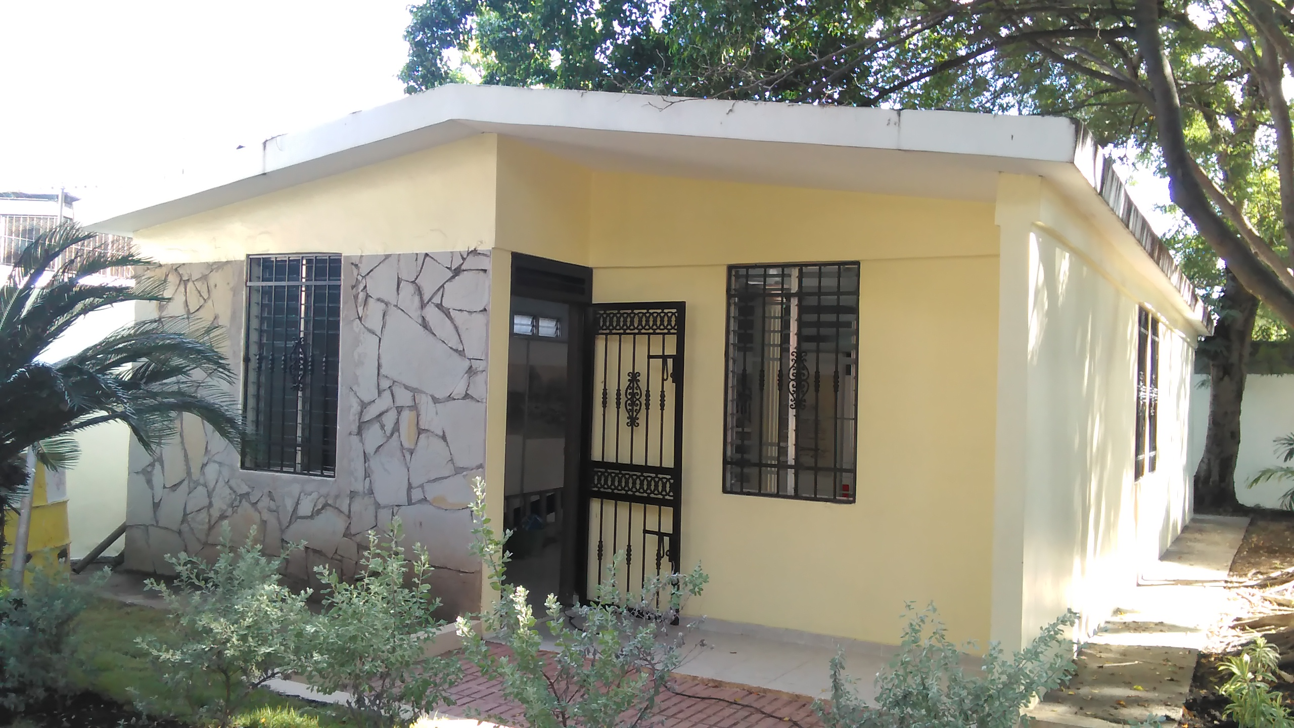 Museo a Máximo Gómez, Baní, República Dominicana.